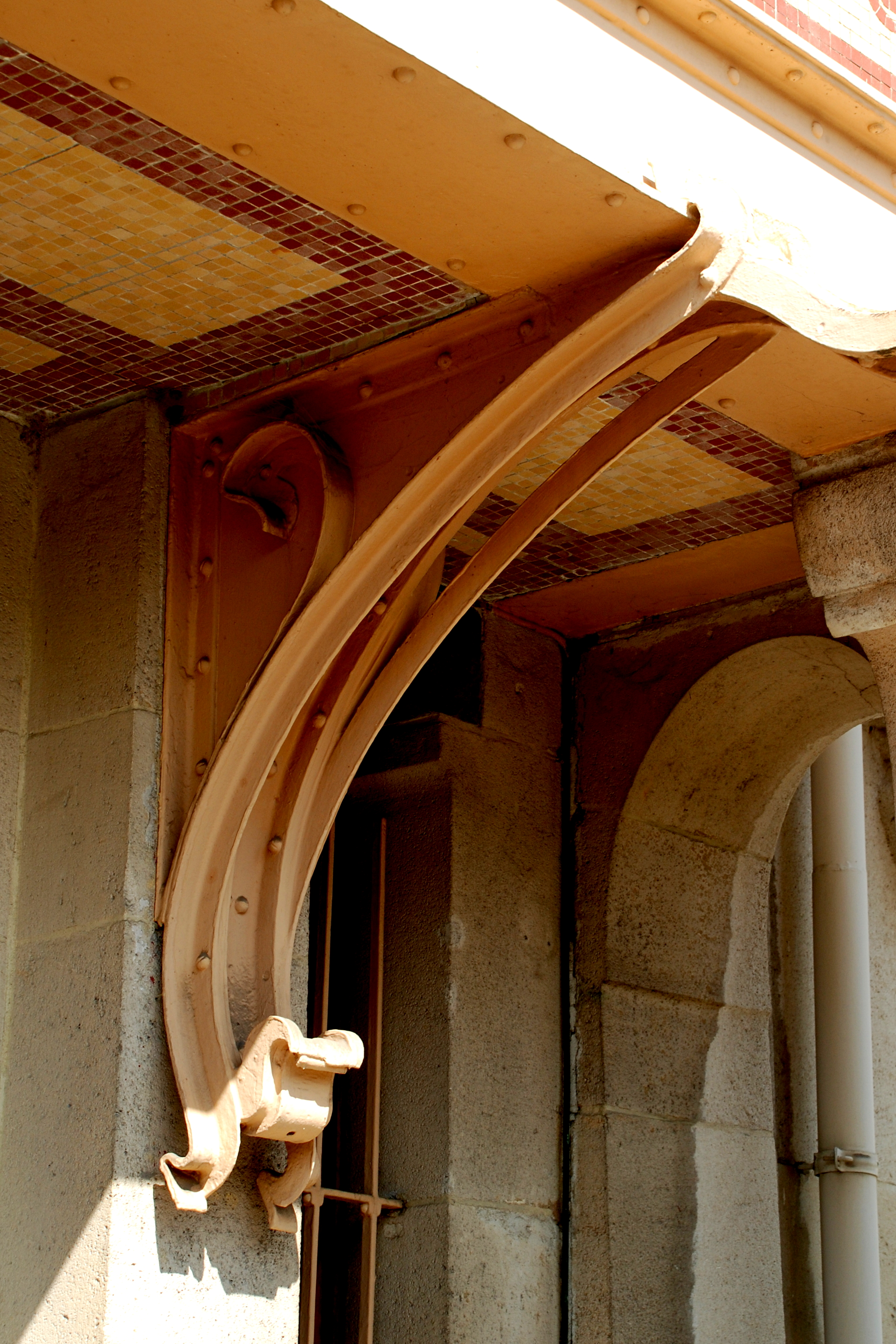 Belgique - Bruxelles - Hôtel Van Eetvelde (Art nouveau - Victor Horta - 1895)